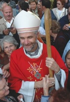 Mgr Jacques Blaquart le jour de son ordination épiscopale (17 septembre 2006)